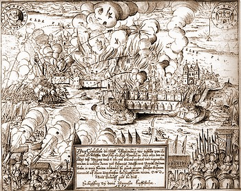 Assedio di Magdeburgo